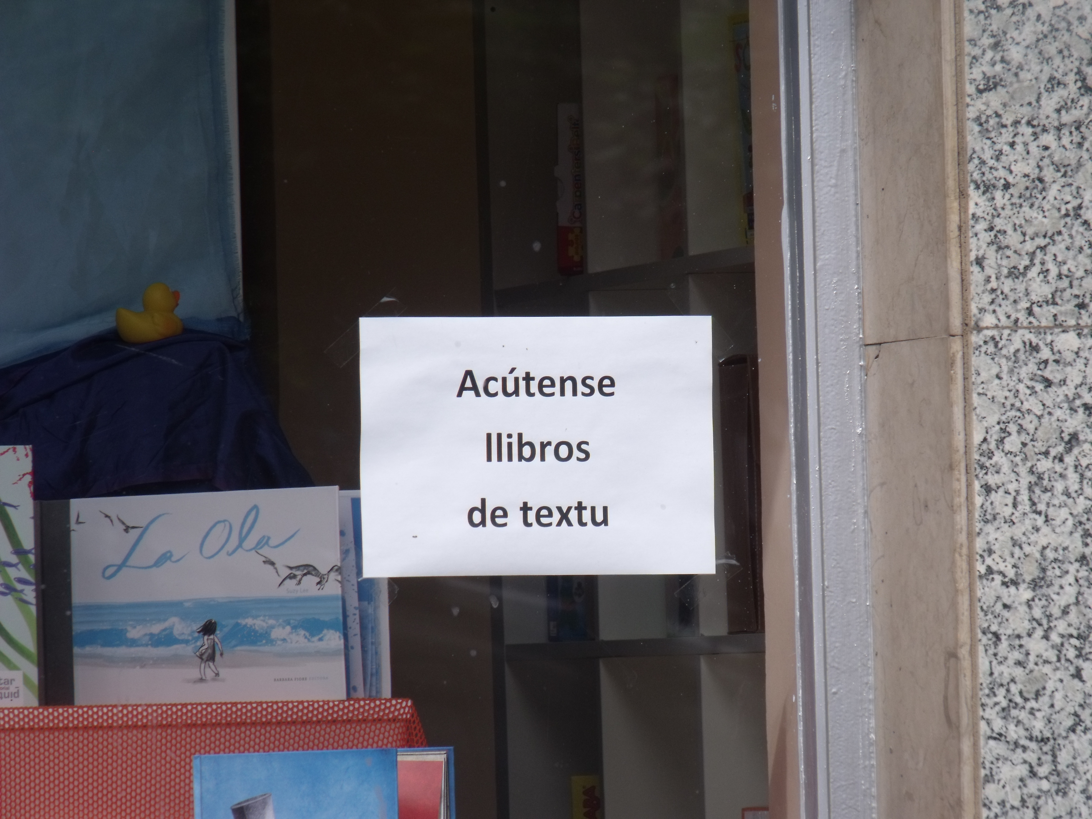 Cartel de aviso privado en un comercio de Candás, Asturias, redactado en asturiano.